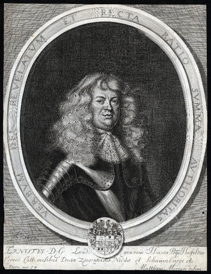 Ernst von Hessen-Rheinfels-Rotenburg